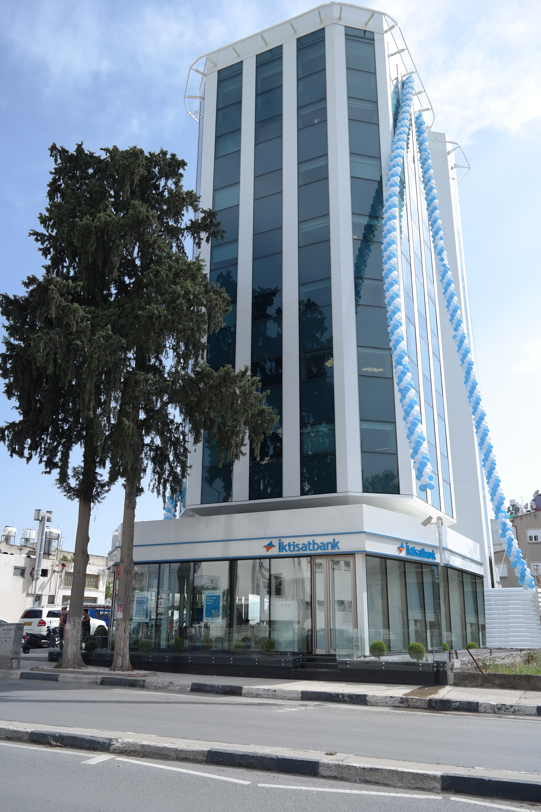 Kıbrıs İktisat Bankası Ltd. Genel Merkez Binası